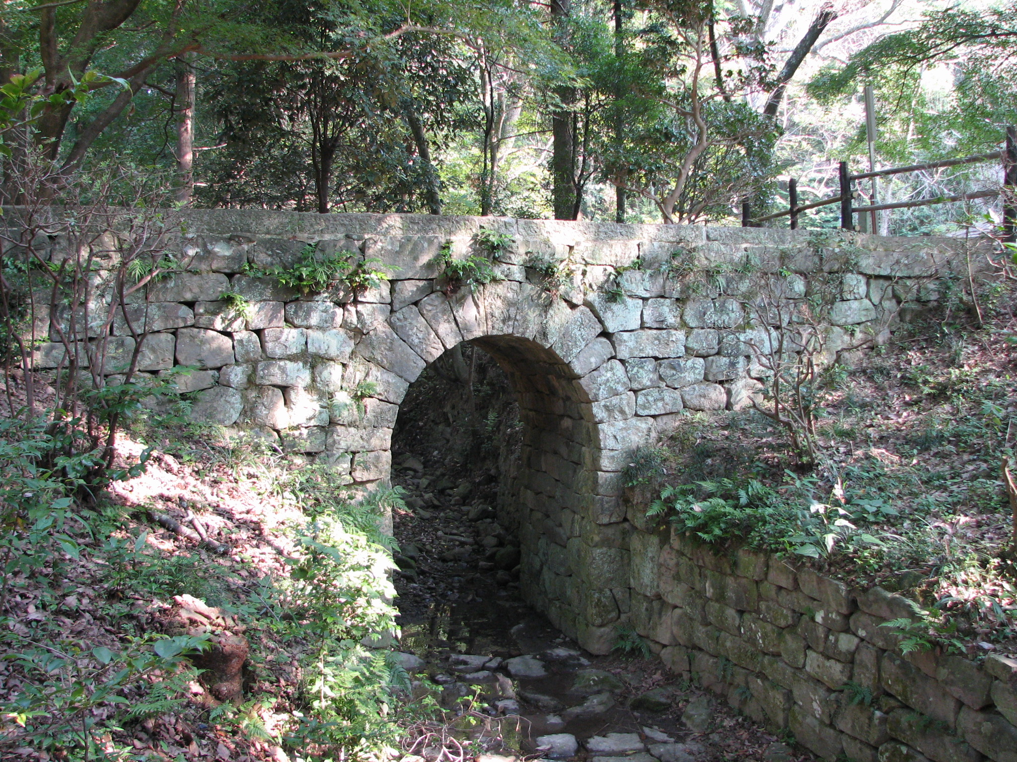 the Doitsu-bashi (German bridge) in Ōasahiko-jinja, Naruto, Tokushima, Japan 大麻比古神社（徳島県鳴門市）「ドイツ橋」